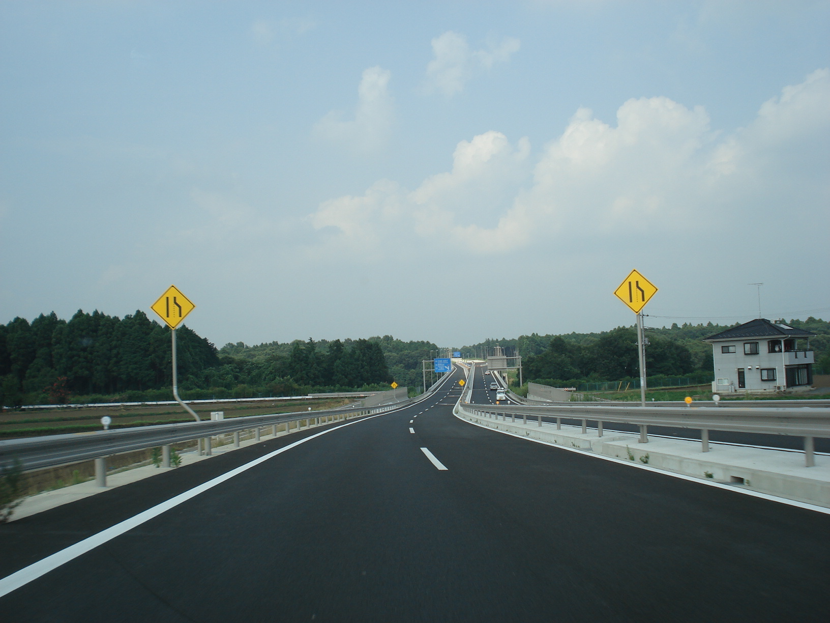 国道408号 鬼怒テクノ通り（真岡北バイパス） 栃木県真岡市亀山付近